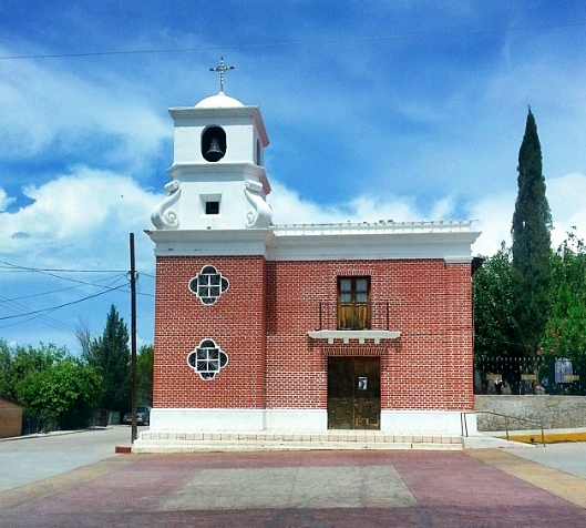 La iglesia patronal de San Miguel Arcángel en Bacoachi, Sonora